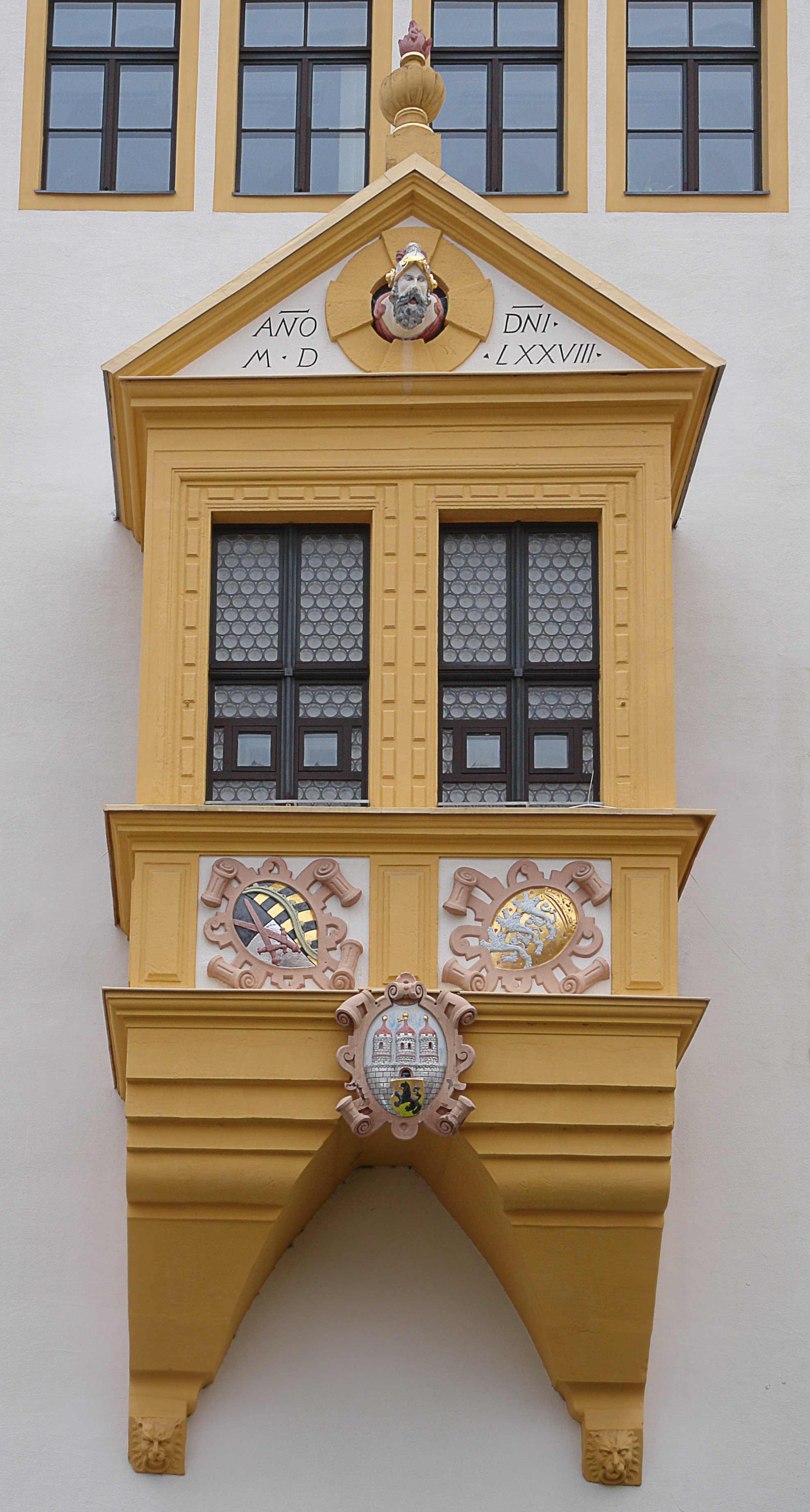 Erker am Rathaus Freiberg mit Allianzwappen des Kurfürsten August von Sachsen und seiner Ehefrau Anna, geb. Prinzessin von Dänemark, über dem Freiberger Stadtwappen; oben angeblich der Kopf von Kunz von Kaufungen